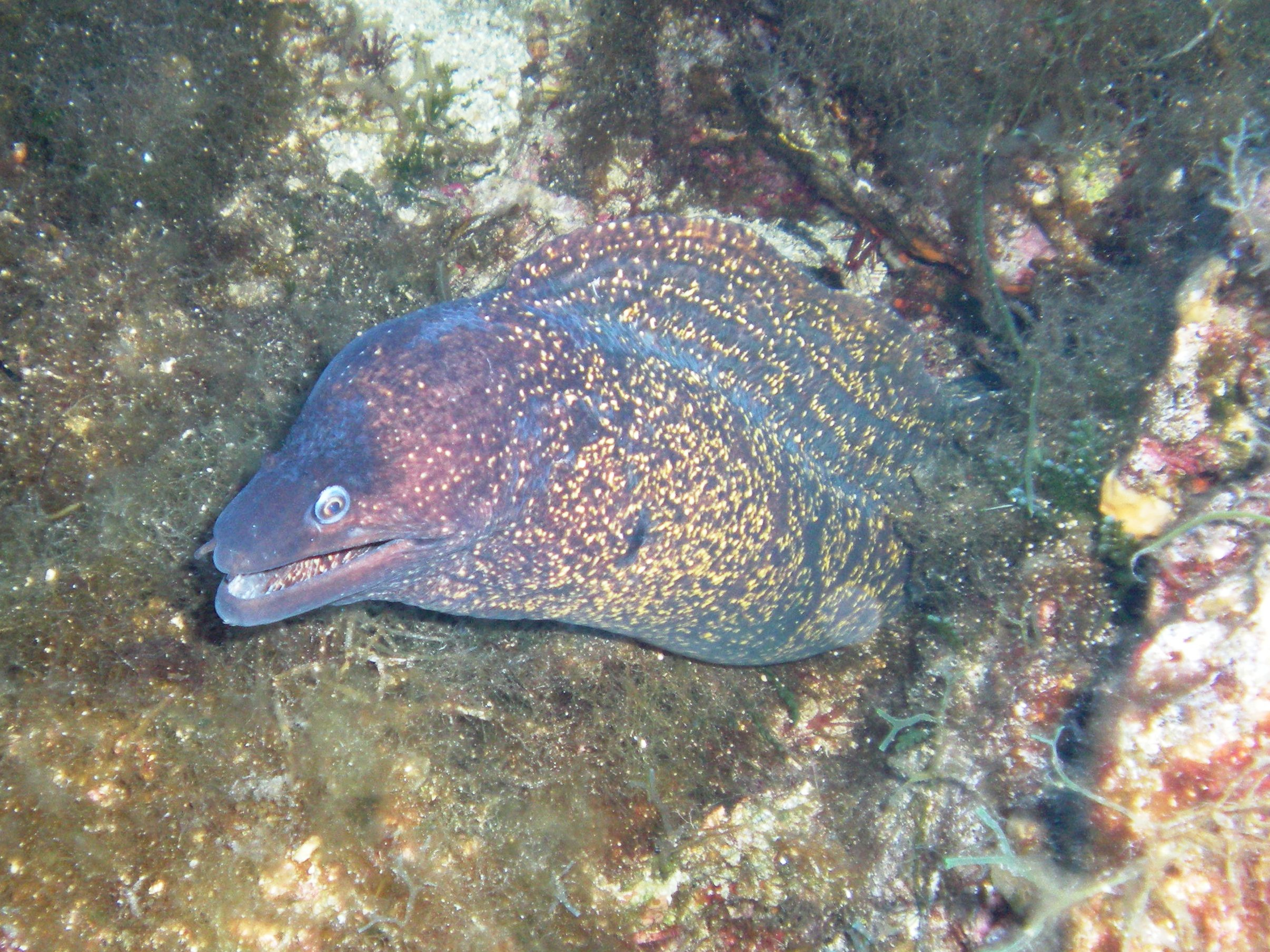 Muraena helenaLinosa, Mediterranean Sea